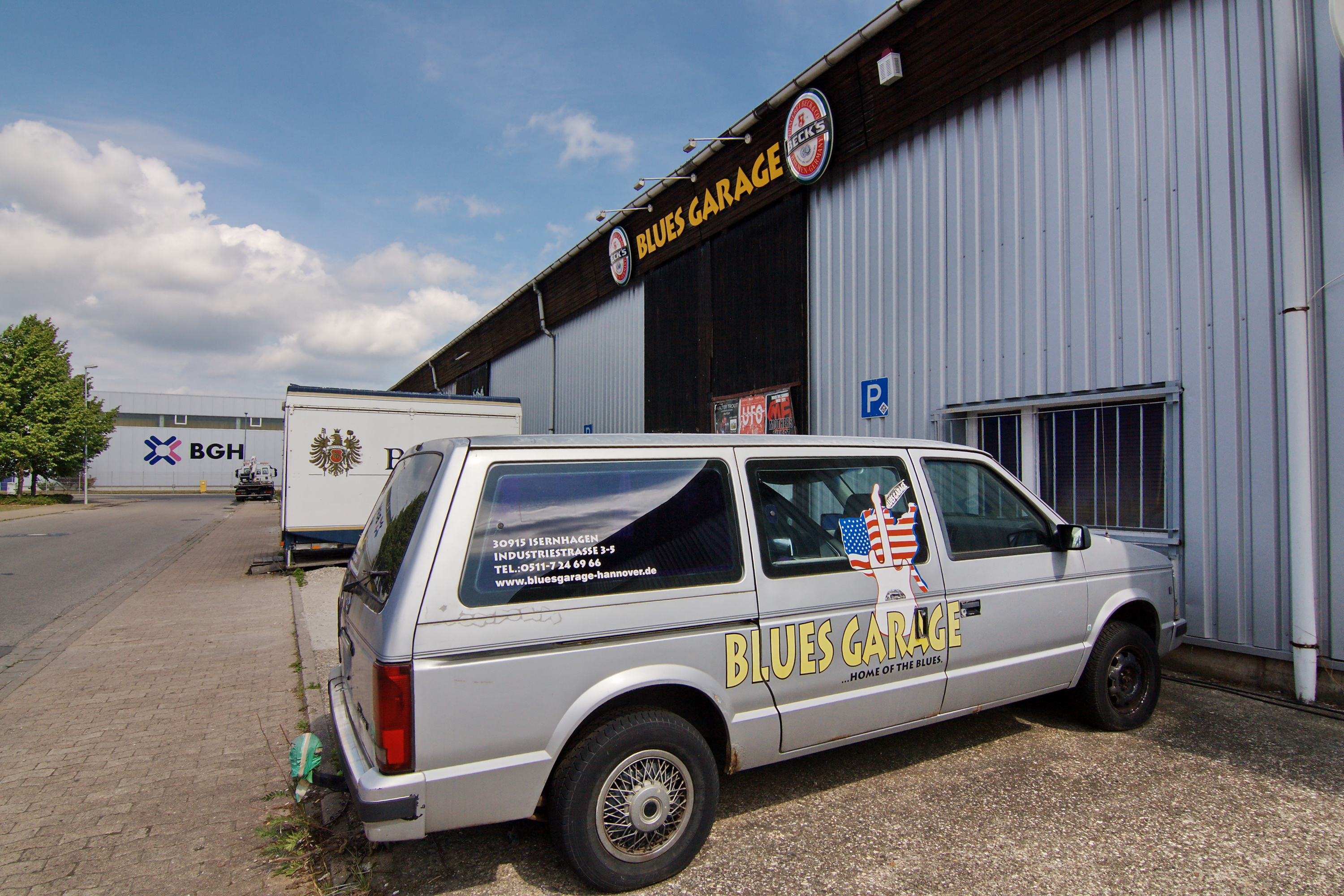 Blues Garage in der Hohenhorster Bauerschaft (Isernhagen), Niedersachsen, Deutschland.